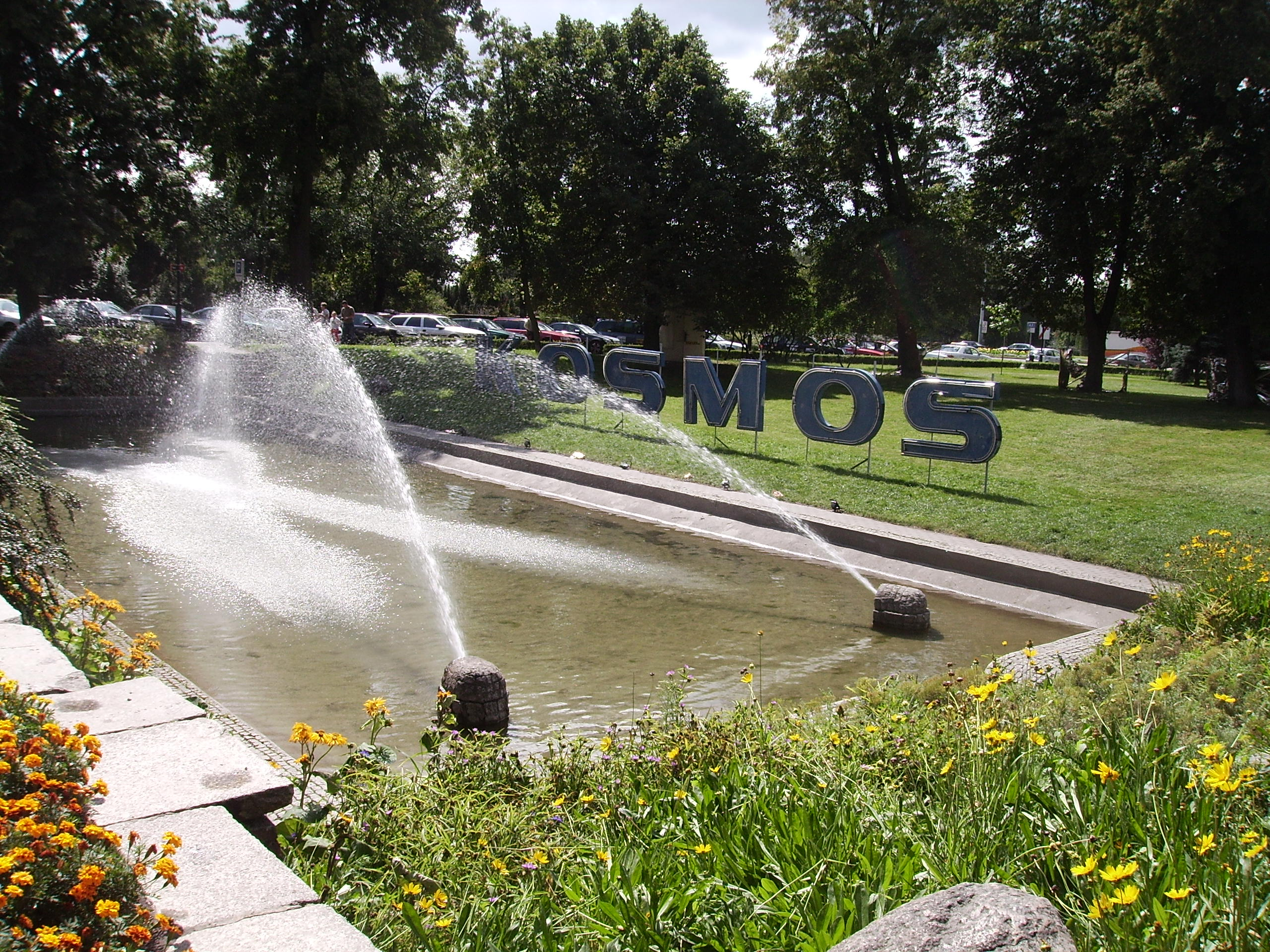 Fontanna on Plac Rapackiego in Torun on Skyway 09